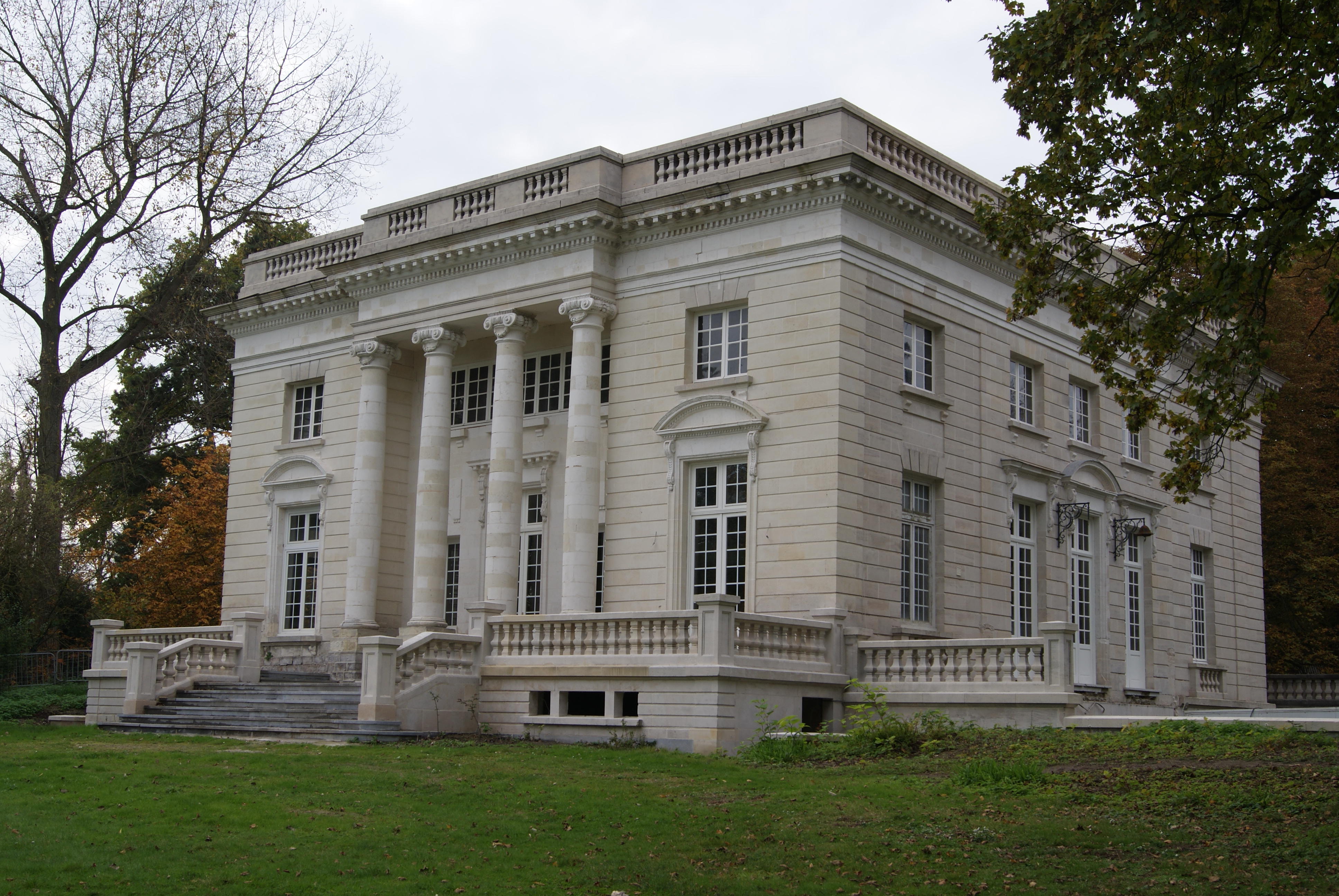 Château de l'abbaye de Cysoing.